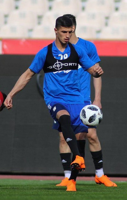 تمرین تیم ملی فوتبال ایران زیر نظر کارلوس کی‌روش